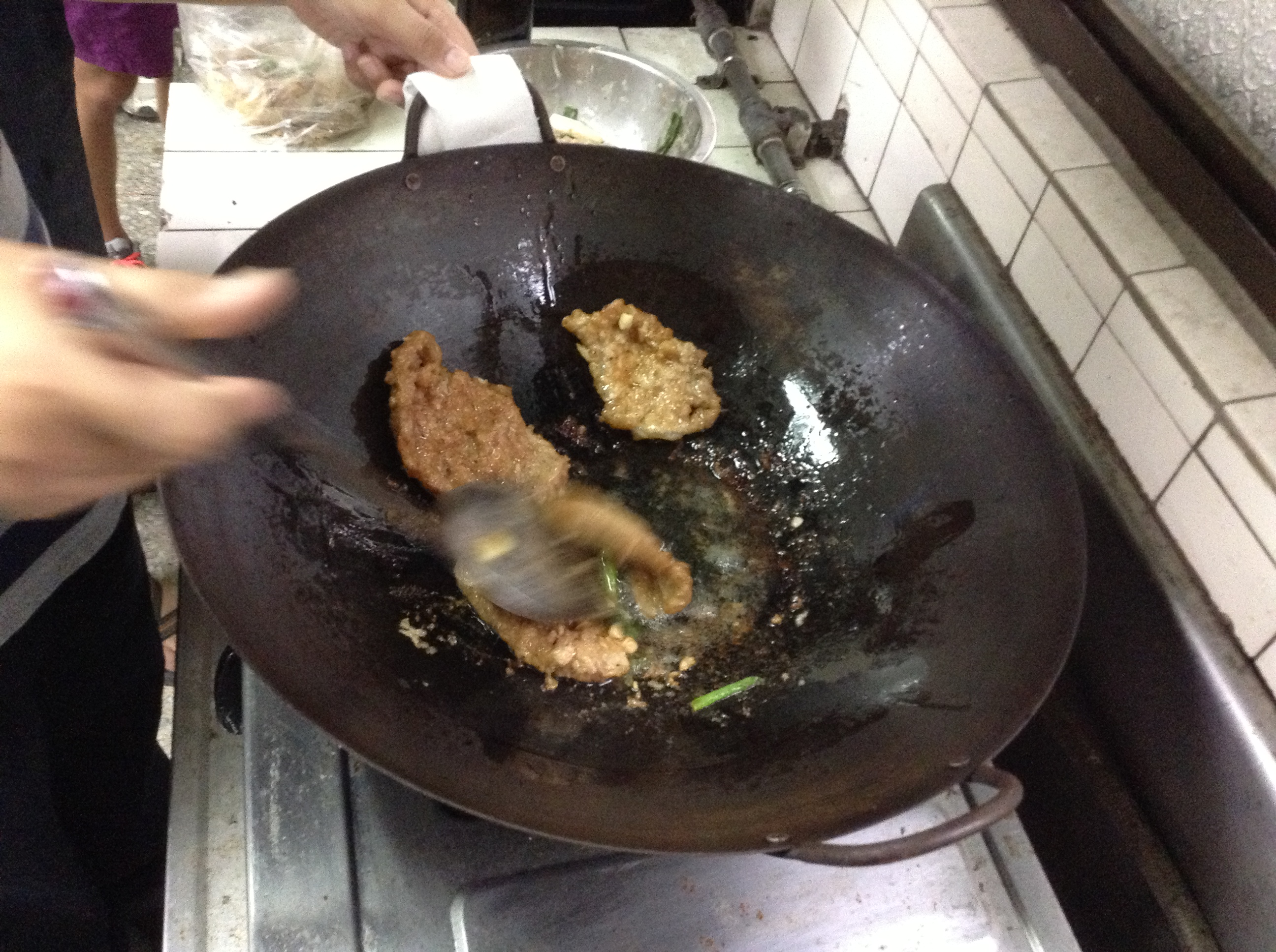 六年制學程吃飯說菜